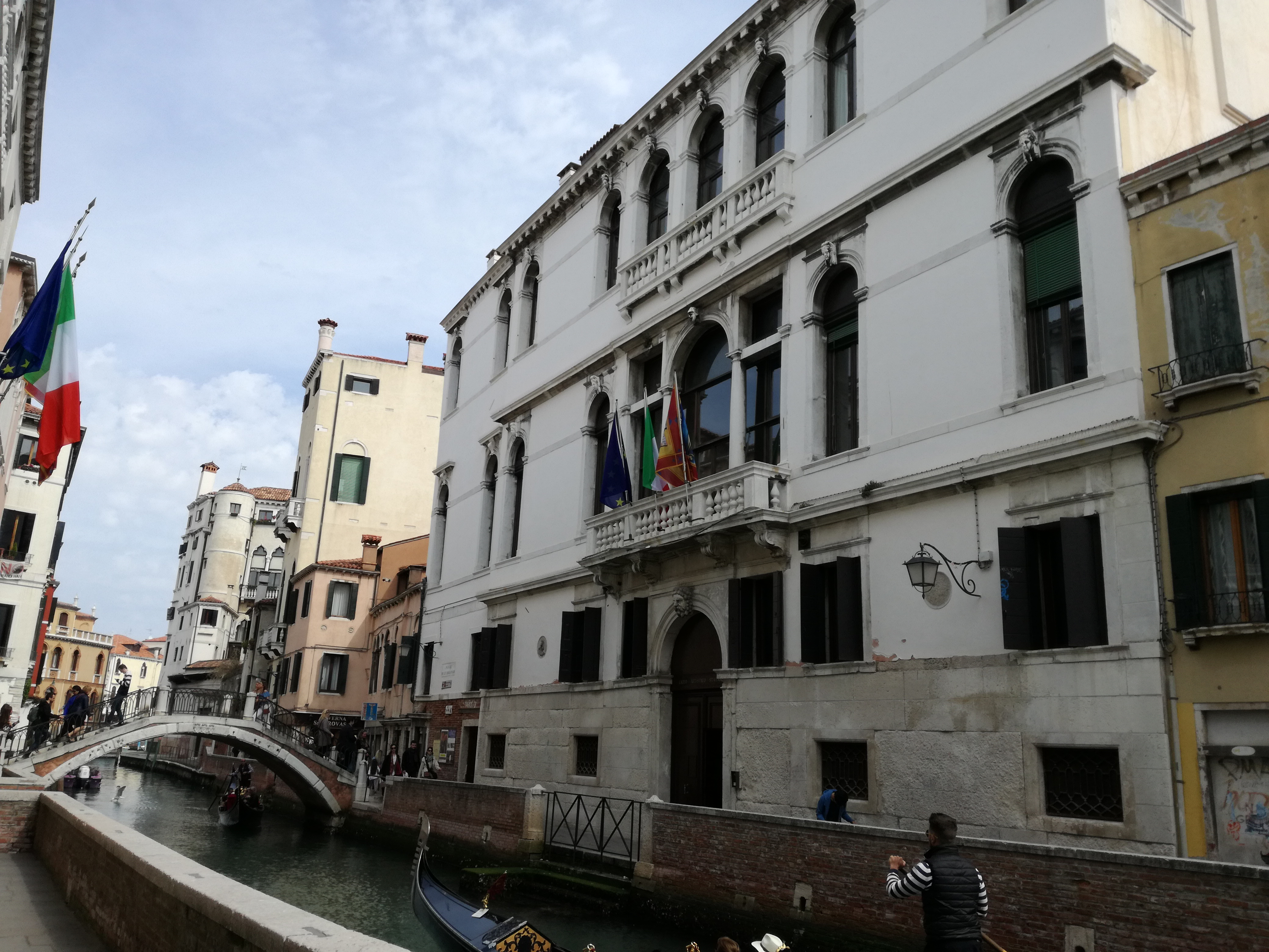 Palazzo Basadonna Giustinian Recanati, sede del Liceo Artistico Statale di Venezia